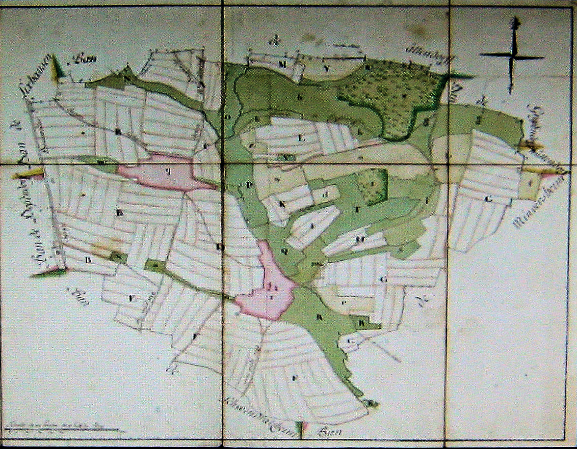 plan du ban des communautés d'altdorff et d'eckendorff en 1760